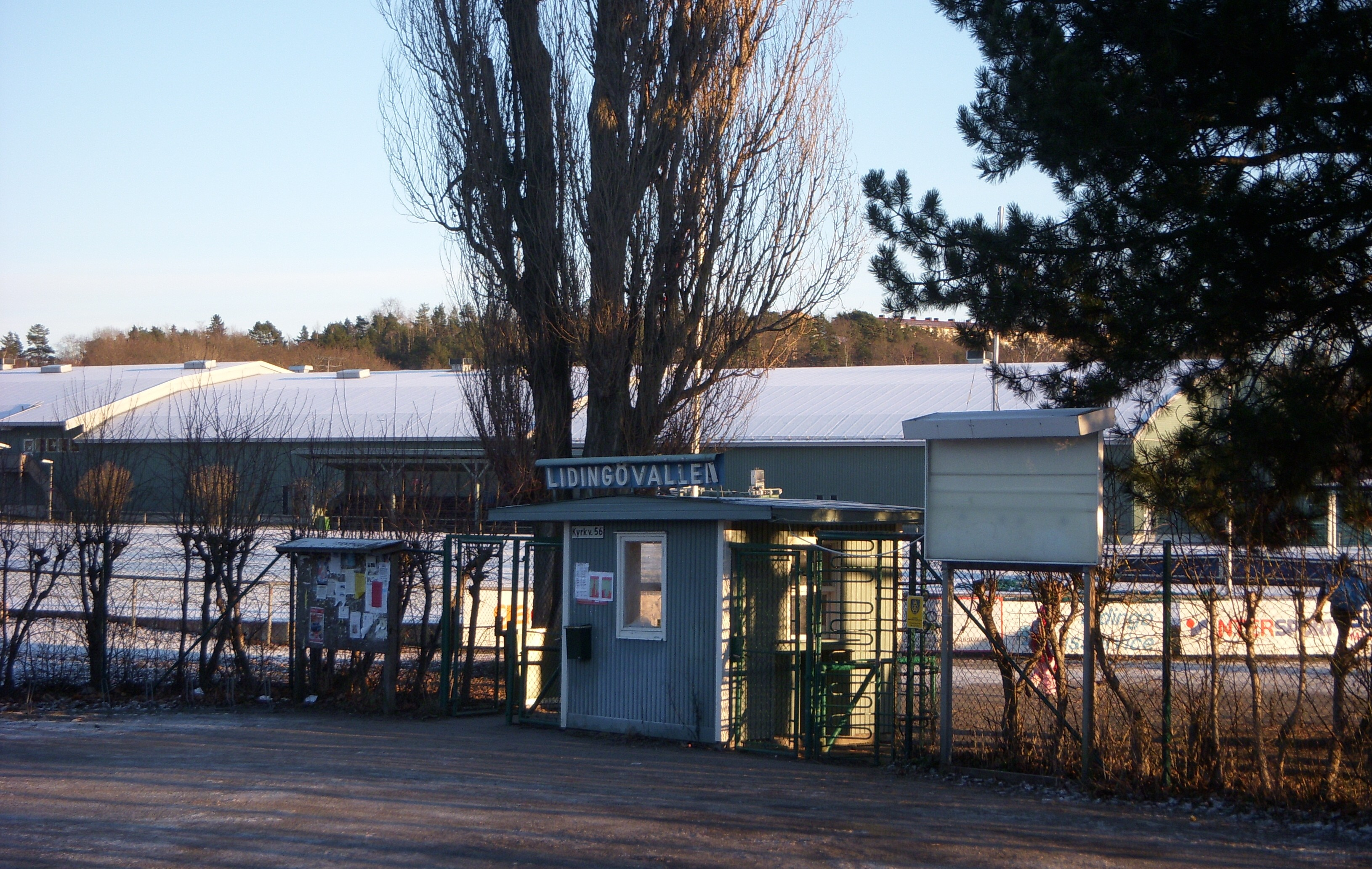 Entrén till "Lidingövallen" på Lidingö